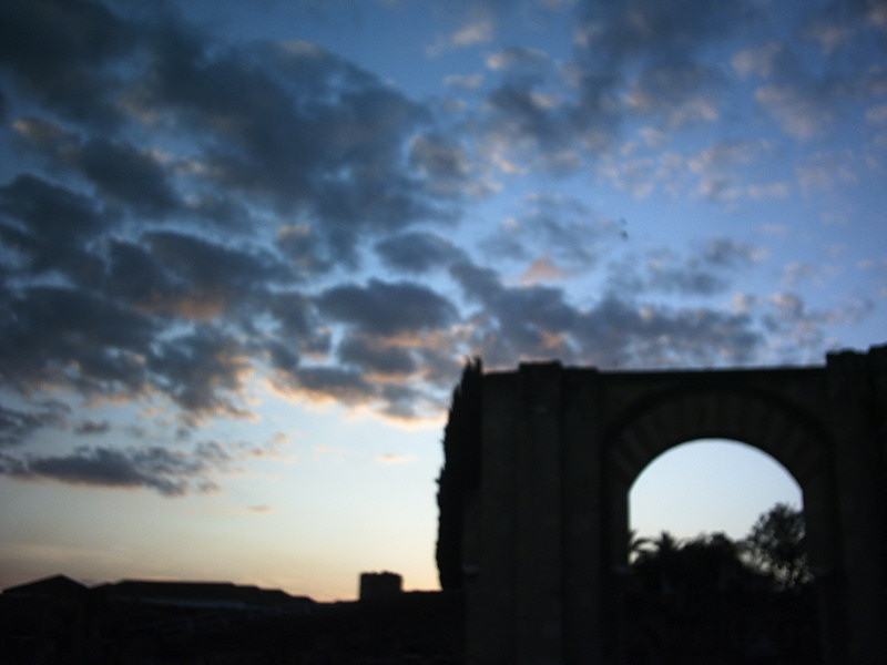 Uno de los cinco arcos del Gran Pórtico del Alcazar en Medina Azahara